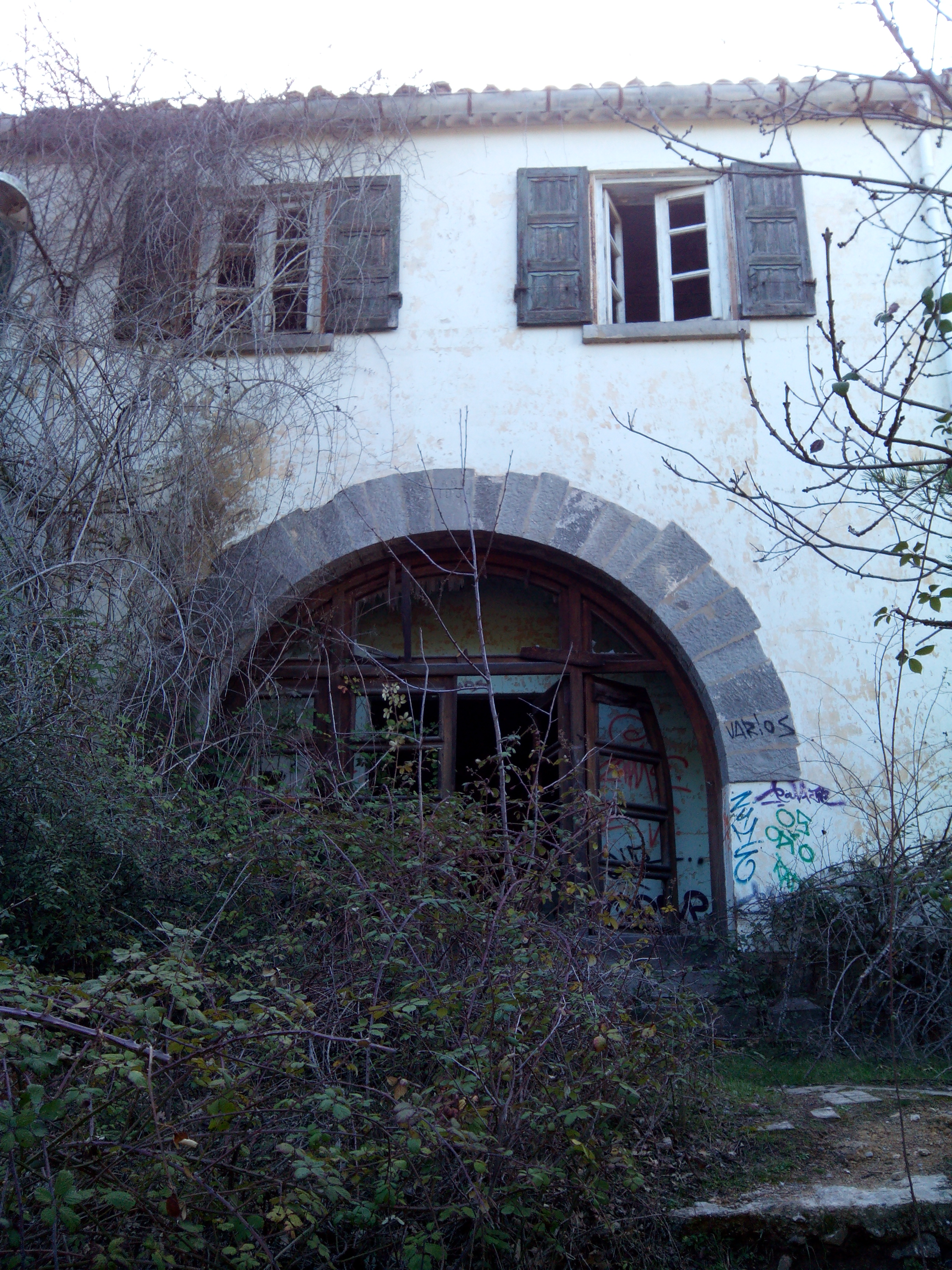 Entrada.